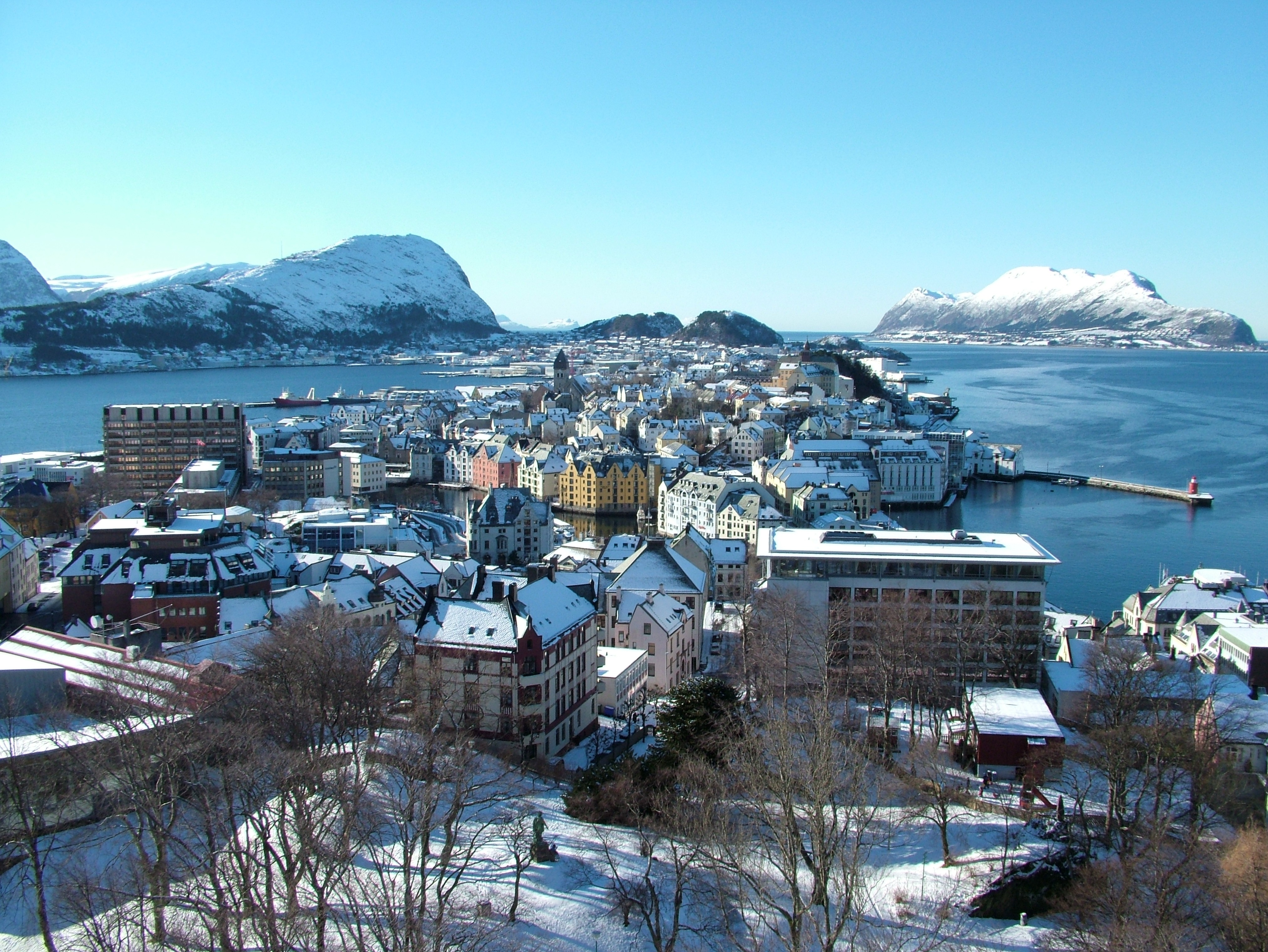 Ålesund, Norwegen, Stadtbild im Februar 2005